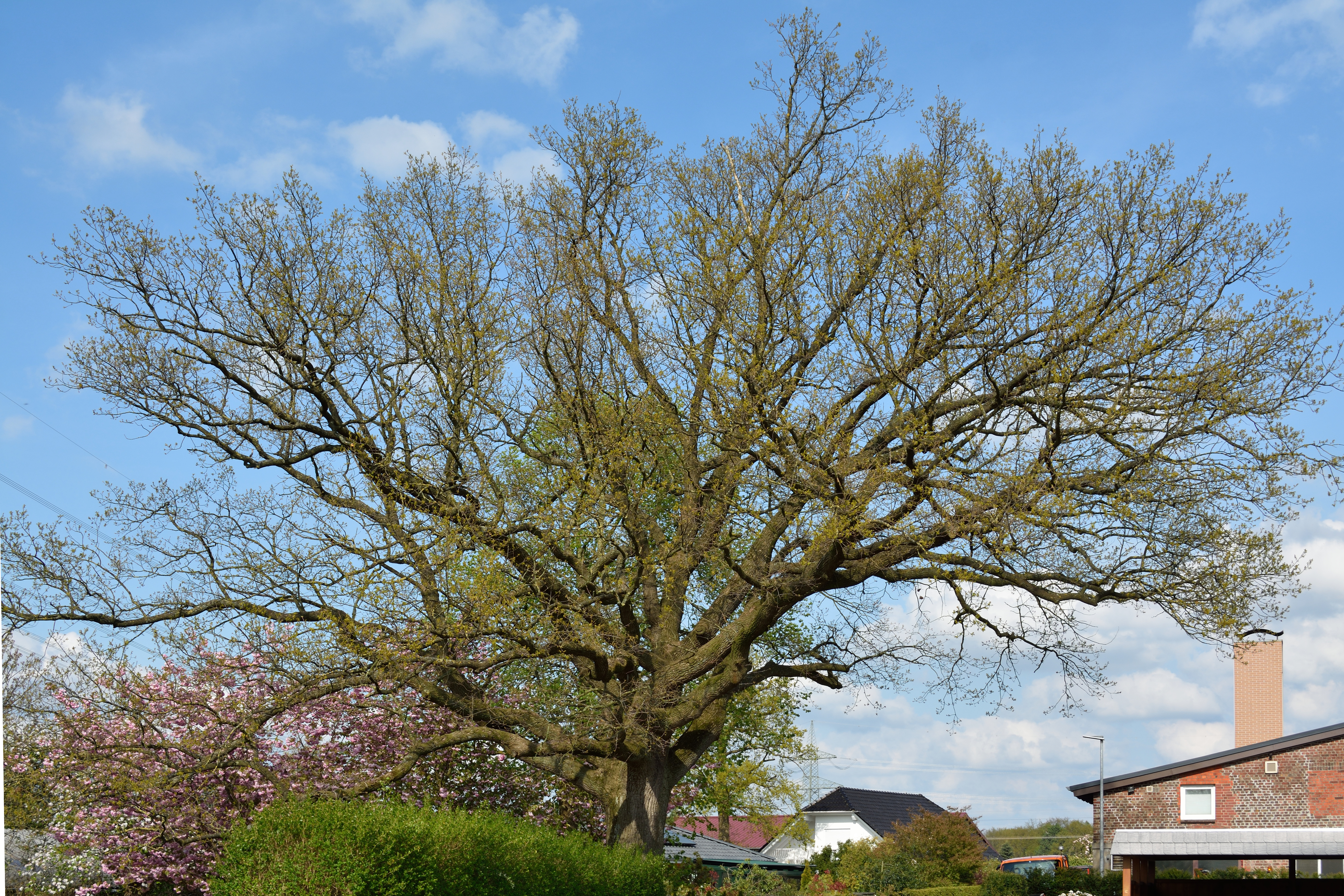 Naturdenkmal im Kreis Pinneberg Stieleiche, Heist, Kleiner Ring 20